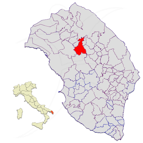 Il territorio del comune di Lequile nella provincia di Lecce